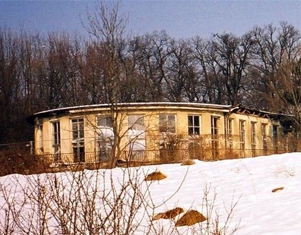 Josef-Afritsch-Heim, Wien XIII (Hietzing)